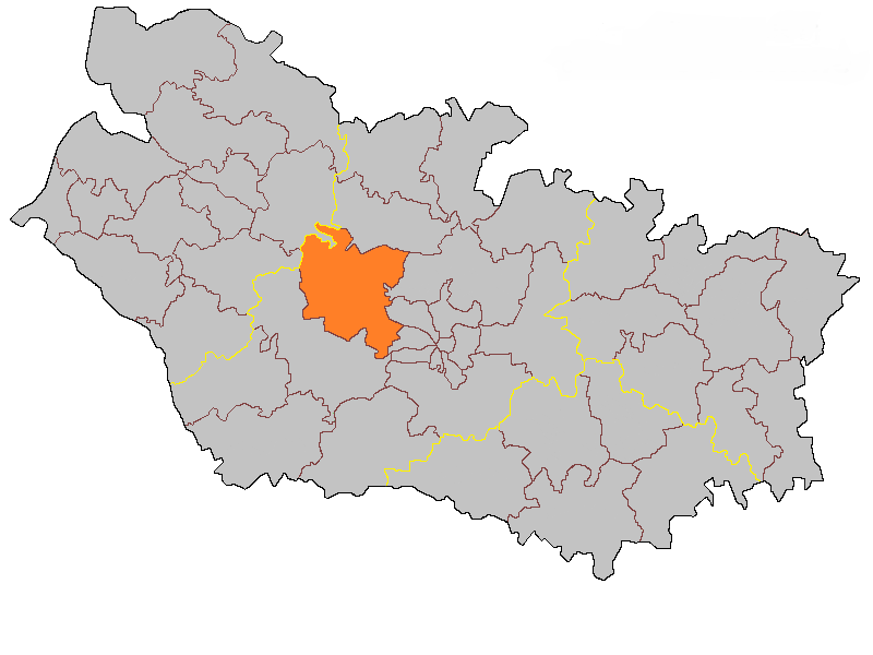 Кантон Пикиньи на карте департамента Сомма